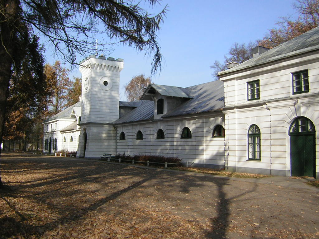 Stajnia zegarowa w stadninie koni.